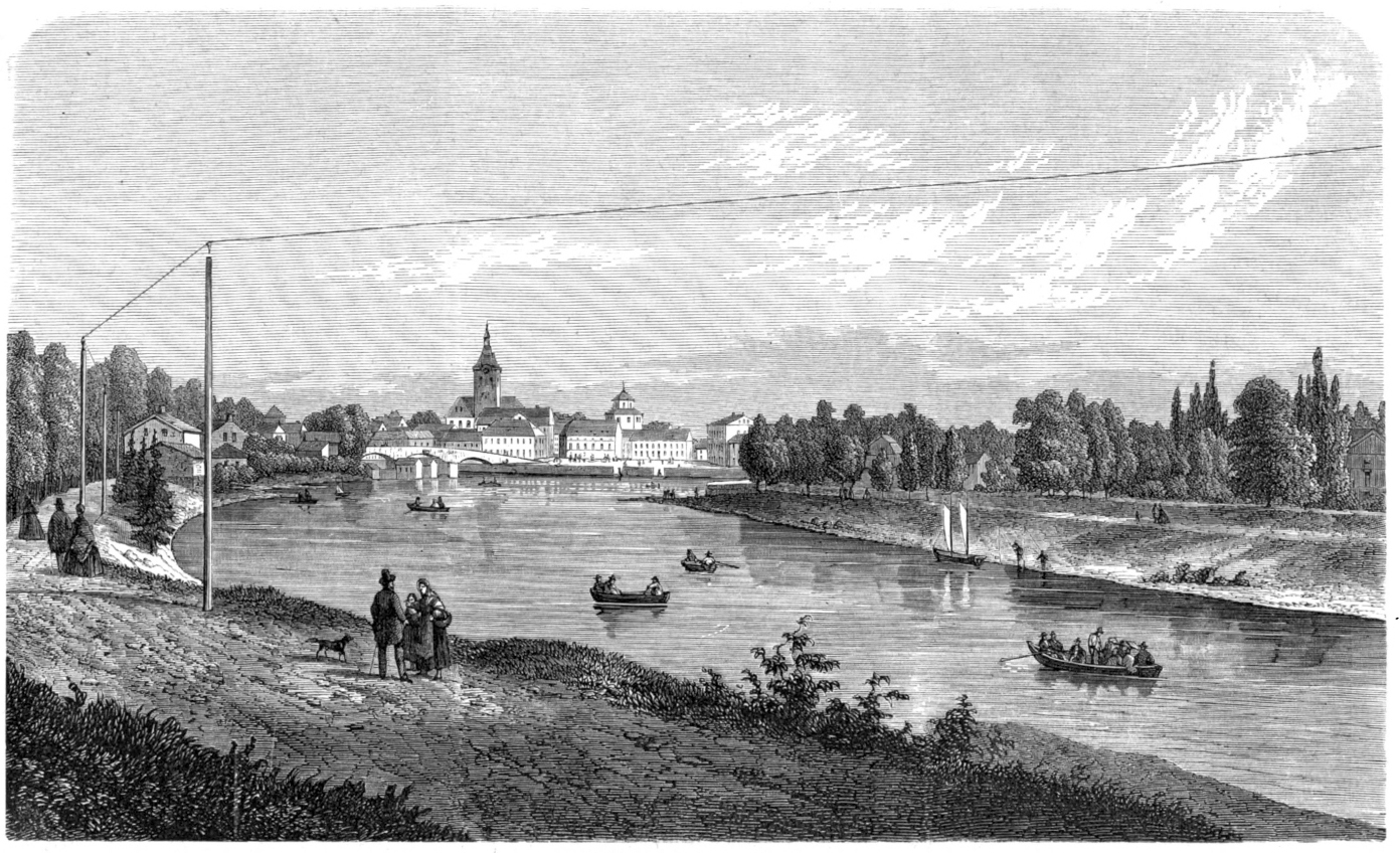 Karlstad. Vy från Klarälven